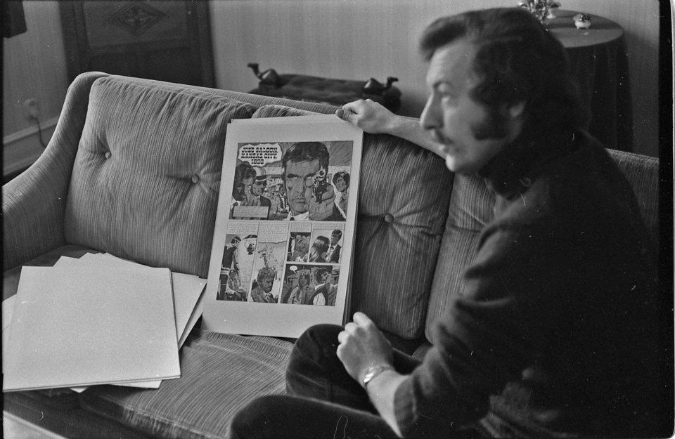 Årets første favorittbilde er valgt ut av arkivar Ketil Zahl i Seksjon for papirdepot og arkivbeskrivelse. Kjell Hallbing alias Louis Masterson, fotografert februar 1973. Ved siden av ham et tegneseriehefte om Morgan Kane. I følge mine kilder, ble den første tegneserien om Kane utgitt i 1975, men den som er oppstilt i sofaen er kanskje en ”prototype?” Morgan Kane var en stor helt på 70 –tallet, og bøkene kommer fortsatt ut i nye opplag (det siste i 2010). Første bok var Uten nåde, som kom i 1966. Serien har solgt godt i inn – og utland. 11 millioner bøker i Norge, og 15 millioner totalt. Fotografiet er hentet fra Privatarkiv 0797, Billedbladet NÅ. Author Kjell Halbing, alias Louis Masterson, photographed February 1973. He’s holding a “Morgan Kane” comic book. According to my sources, the first comic book about Morgan Kane was released in 1975, so this might be a prototype? Morgan Kane was a great hero in the 70s, and the series is still being published. The first book, “No mercy”, was released in 1966. The series has sold well both in Norway and abroad; 11 million copies in Norway alone, 15-20 million worldwide.